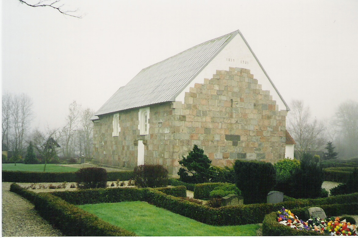 Skader Kirke, Syddjurs Kommune